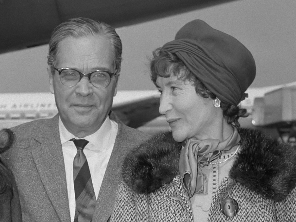 Gouverneur Nicolaaas (Cola) Debrot in ons land. Rechts zijn echtgenote Estelle Reed. 15 mei 1963